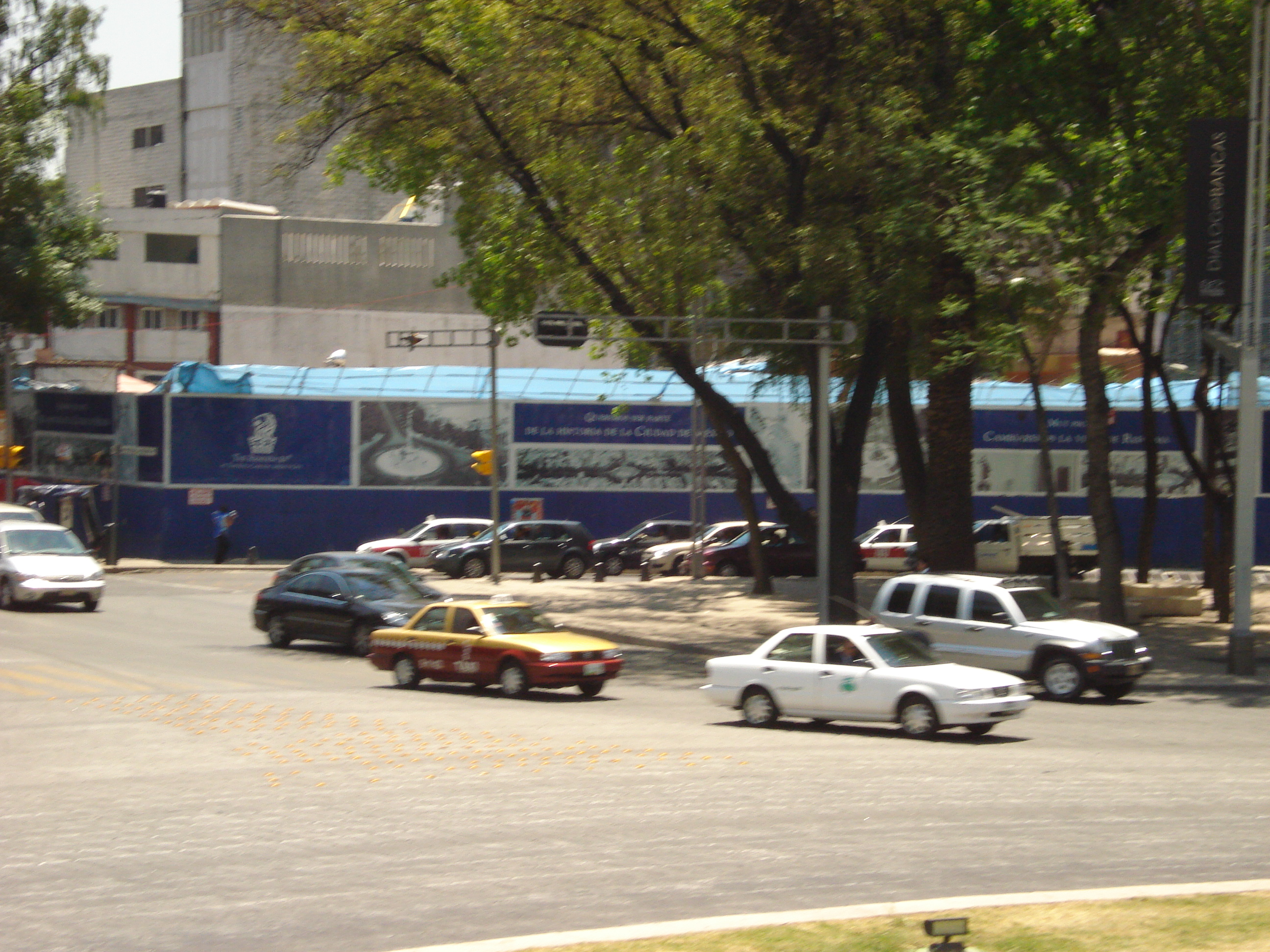 Predio en donde se está construyendo la Torre New York Life, la cual tendrá una altura de 150.1 metros.